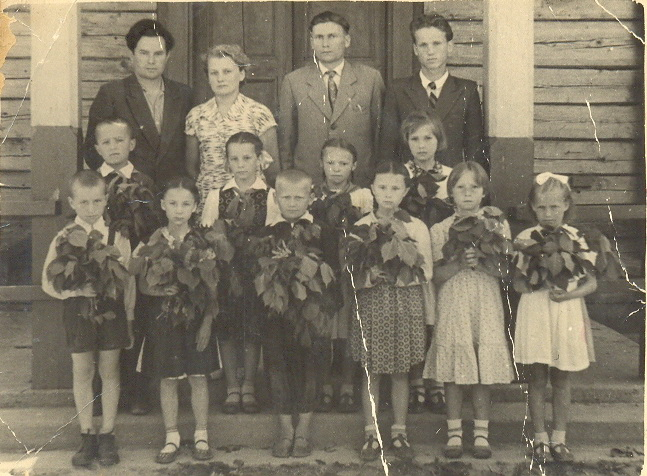 Віталь Гарановіч - вучань Ермакоўскай школы